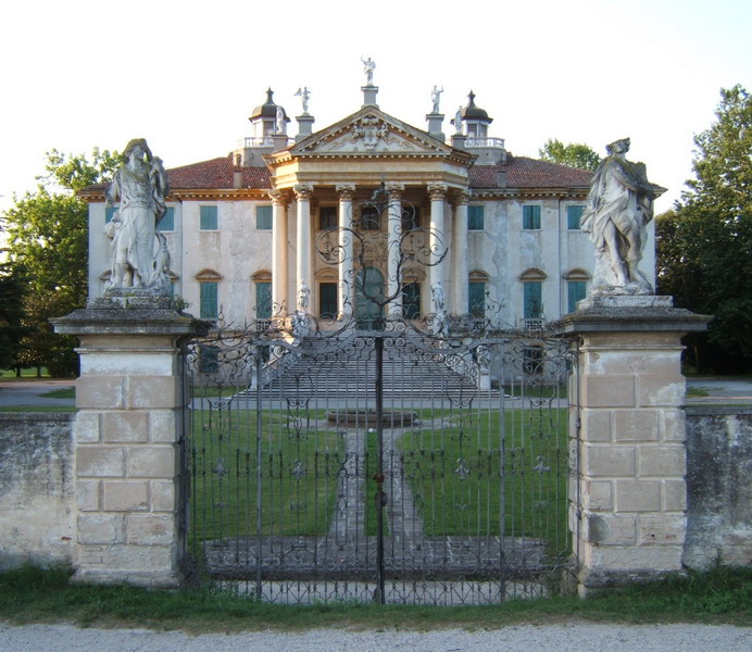 Villa giovannelli